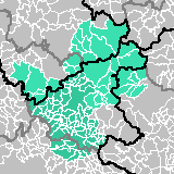 Mappa della Sabina. In colore più scuro la sabina moderna.